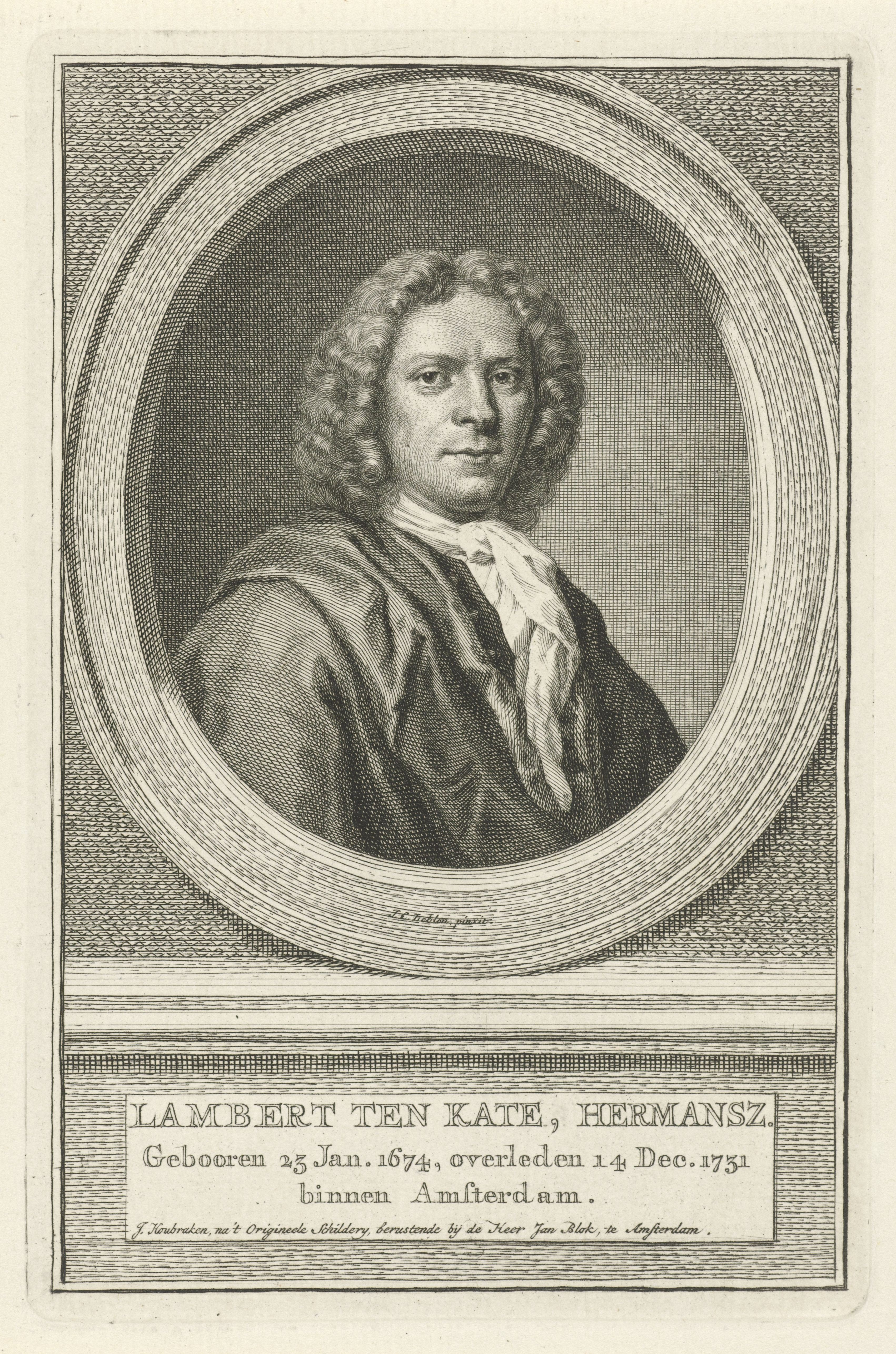 IdentificatieTitel(s): Portret van Lambert ten Kate. Lambert ten Kate, Hermansz. (titel op object)Objecttype: prent Objectnummer: RP-P-OB-48.671Catalogusreferentie: Ver Huell 244-2(2)FMP 2872-aOpschriften / Merken: verzamelaarsmerk, verso, gestempeld: Lugt 2228Omschrijving: Buste naar rechts van Lambert ten Kate in een ovaal. Het portret rust op een plint waarop zijn naam en gegevens in drie regels in het Nederlands.VervaardigingVervaardiger: prentmaker: Jacob Houbraken (vermeld op object) naar schilderij van: Jacob Christof Le Blon (vermeld op object)Plaats vervaardiging: AmsterdamDatering: 1708 - 1780Fysieke kenmerken: gravureMateriaal: papier Techniek: graveren (drukprocedé)Afmetingen: plaatrand: h 181 mm × b 119 mmOnderwerpWie: Lambert ten KateVerwerving en rechtenVerwerving: onbekendCopyright: Publiek domein